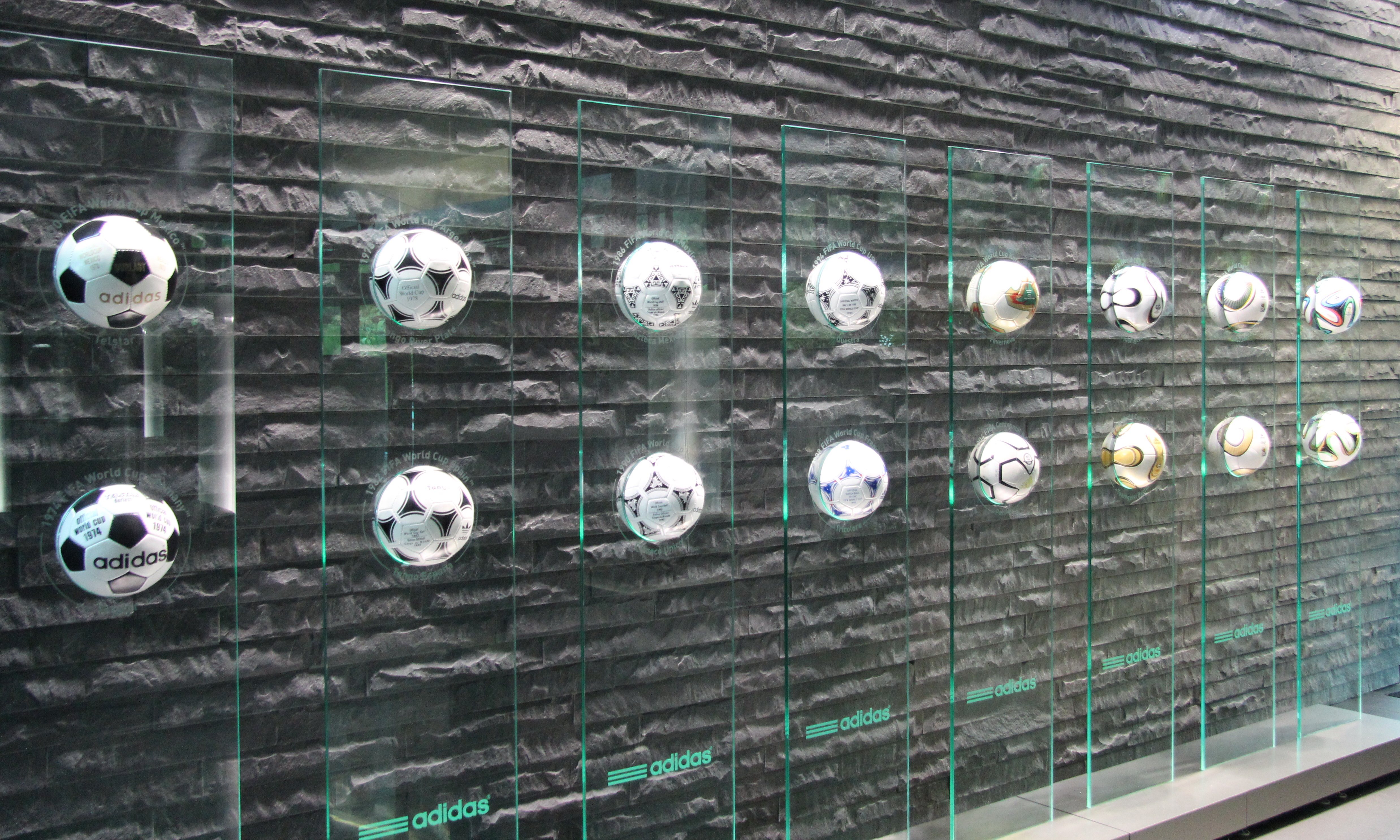 World Cupballen in de hal van het FIFA-hoofdkantoor in Zürich, Zwitserland.